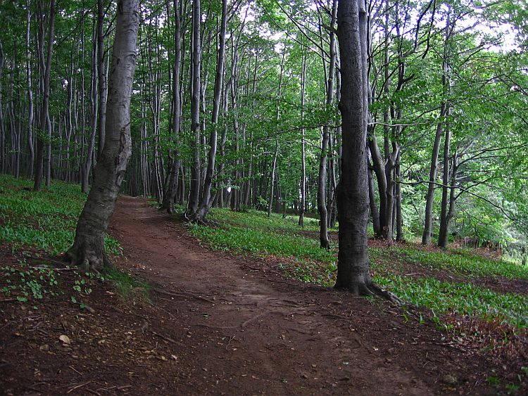 Bukowa Góra, Ujejsce, Dąbrowa Górnicza